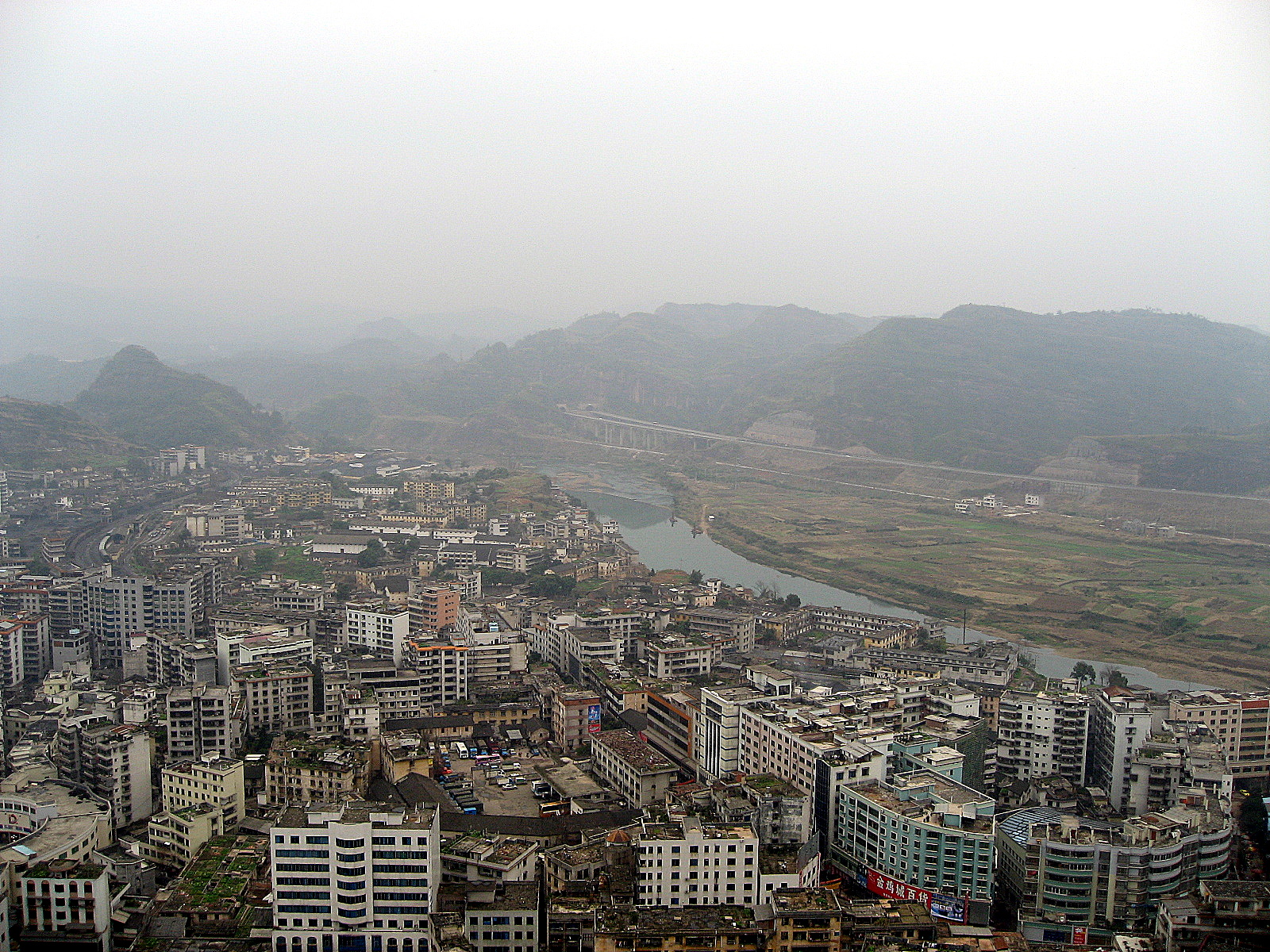 韶关坪石镇金鸡岭 - 坪石镇